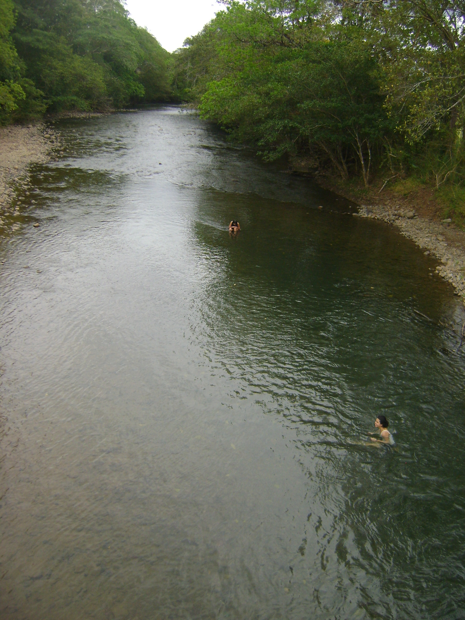 Río San Juan, Veraguas